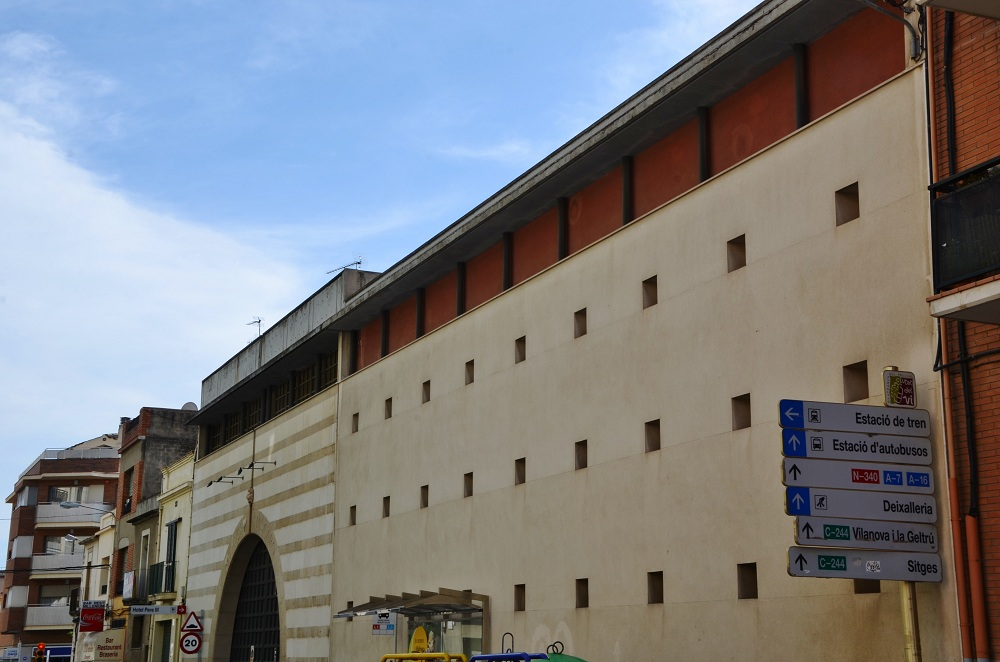 Habitatge al carrer Santa Digna, 36 (Vilafranca del Penedès)